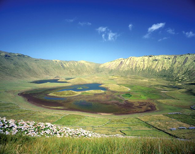 A Lagoa do Caldeirão alojada na cratera vulcânica, ilha do Corvo, Açores